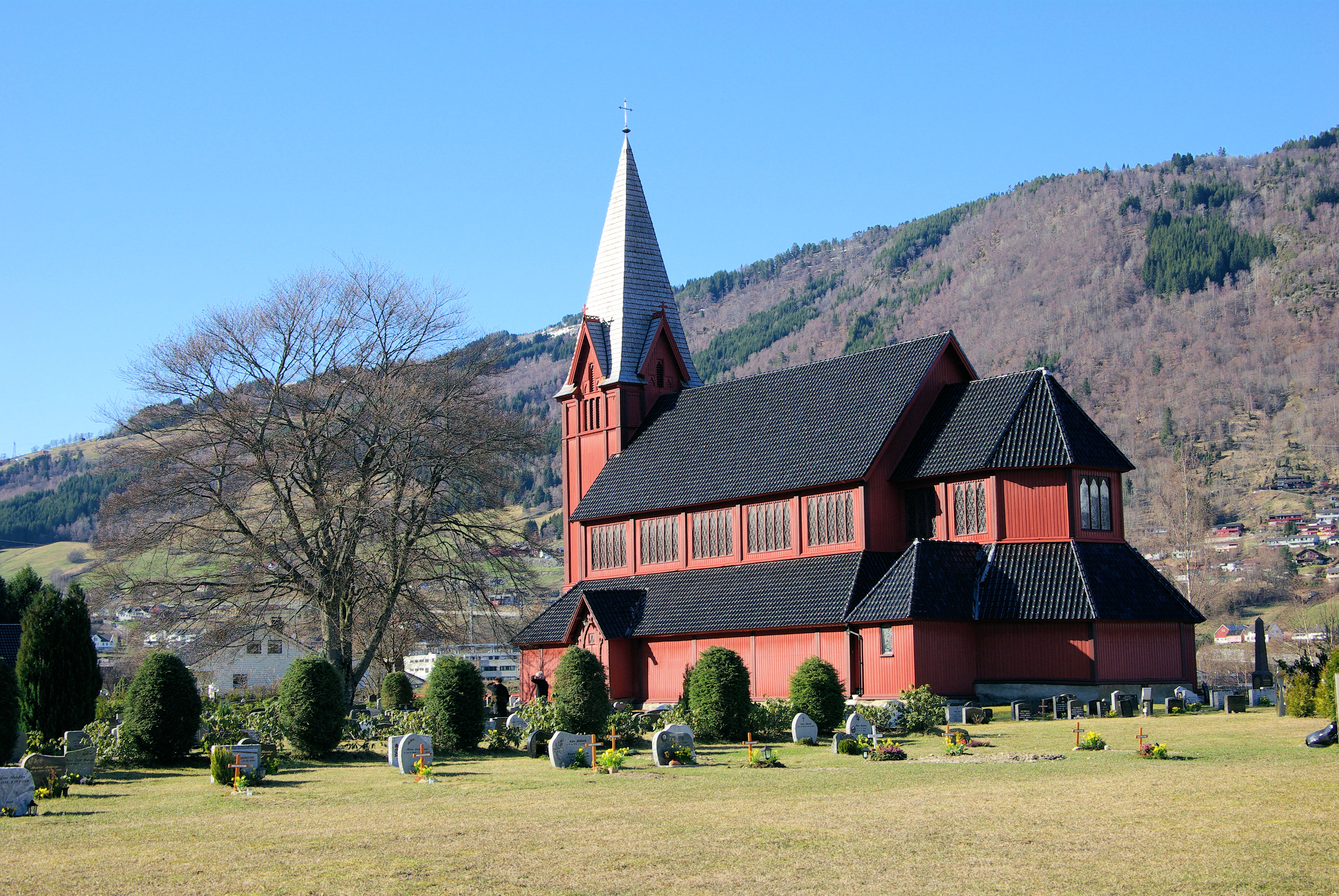 Stedje kyrkje in Sogndal, Sogn og Fjordane